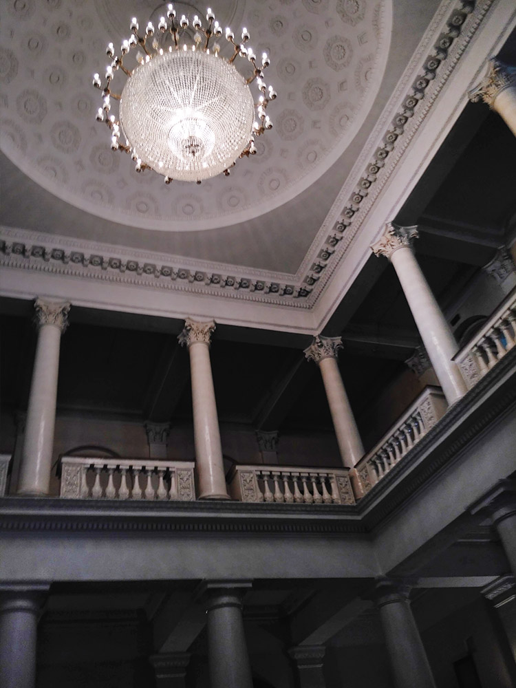 Вестибюль Потьомкінського палацу.